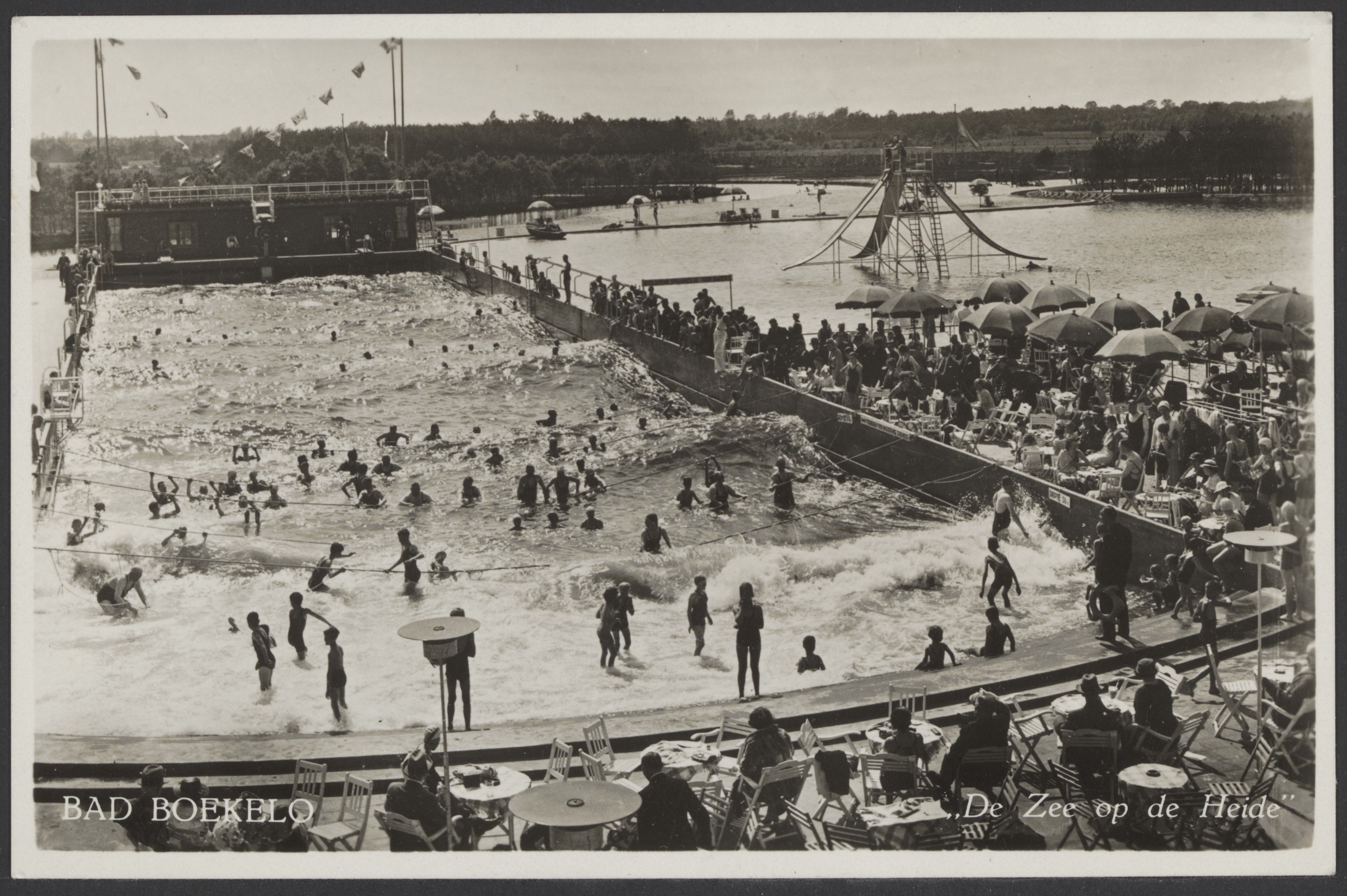 Bad Boekelo "De zee op de heide".